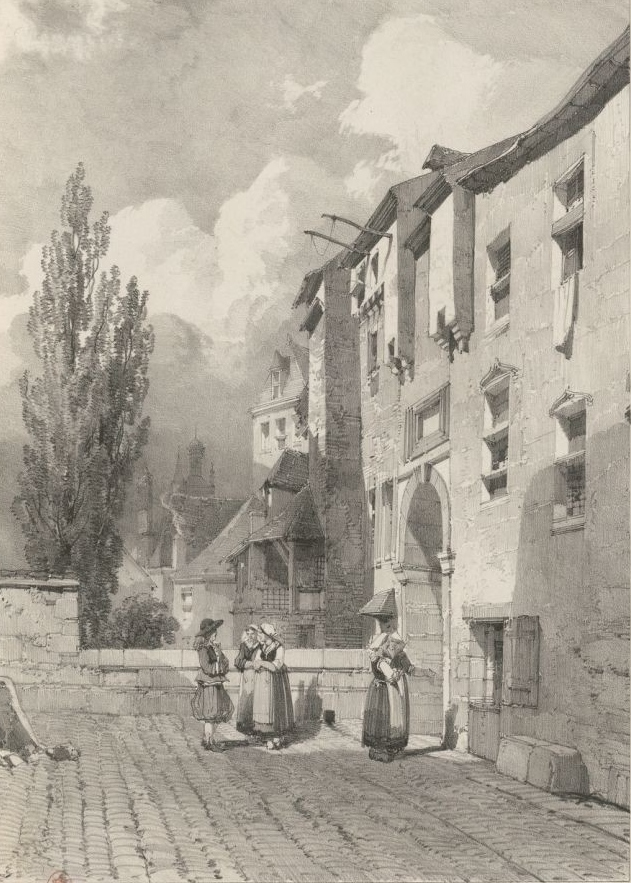 Morlaix : maison où est né le général Moreau (dessin d'Auguste Mayer publié en 1845-1846)